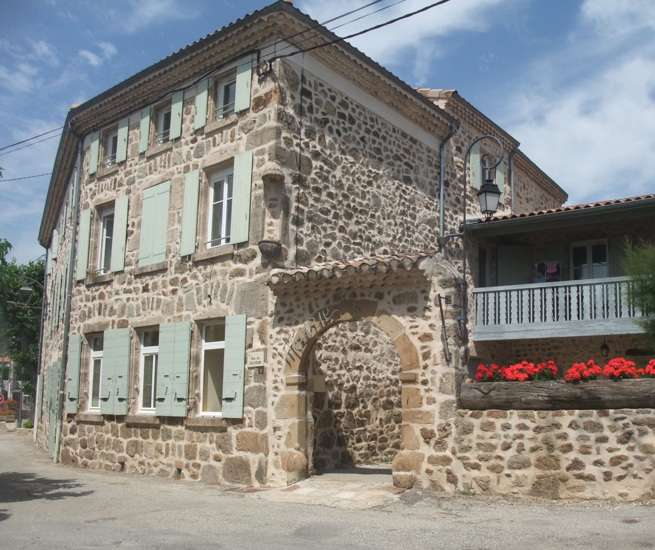 Saint-Clair (Ardèche) mairie